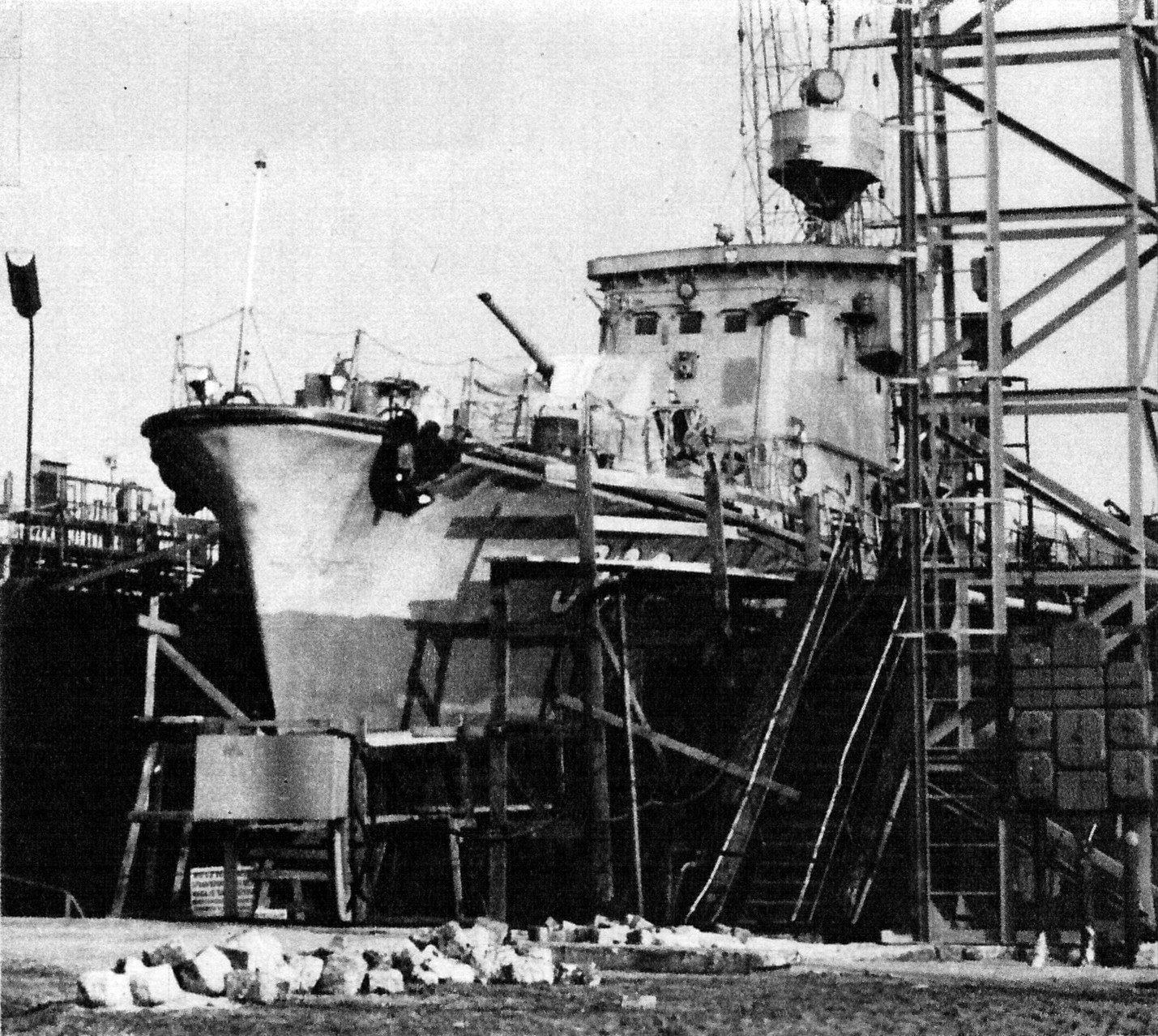 Polski ścigacz okrętów podwodnych proj.122bis w doku